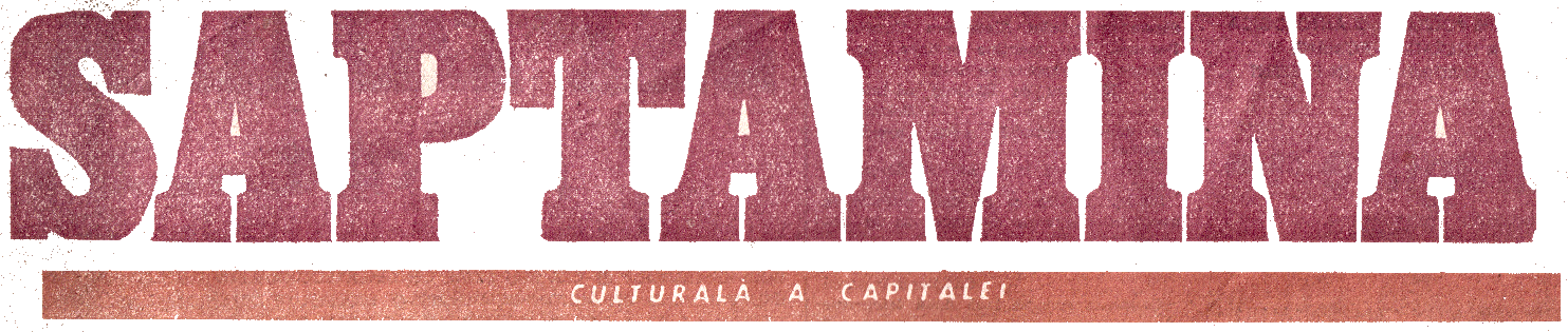 Săptămâna Culturală a Capitalei - Logo